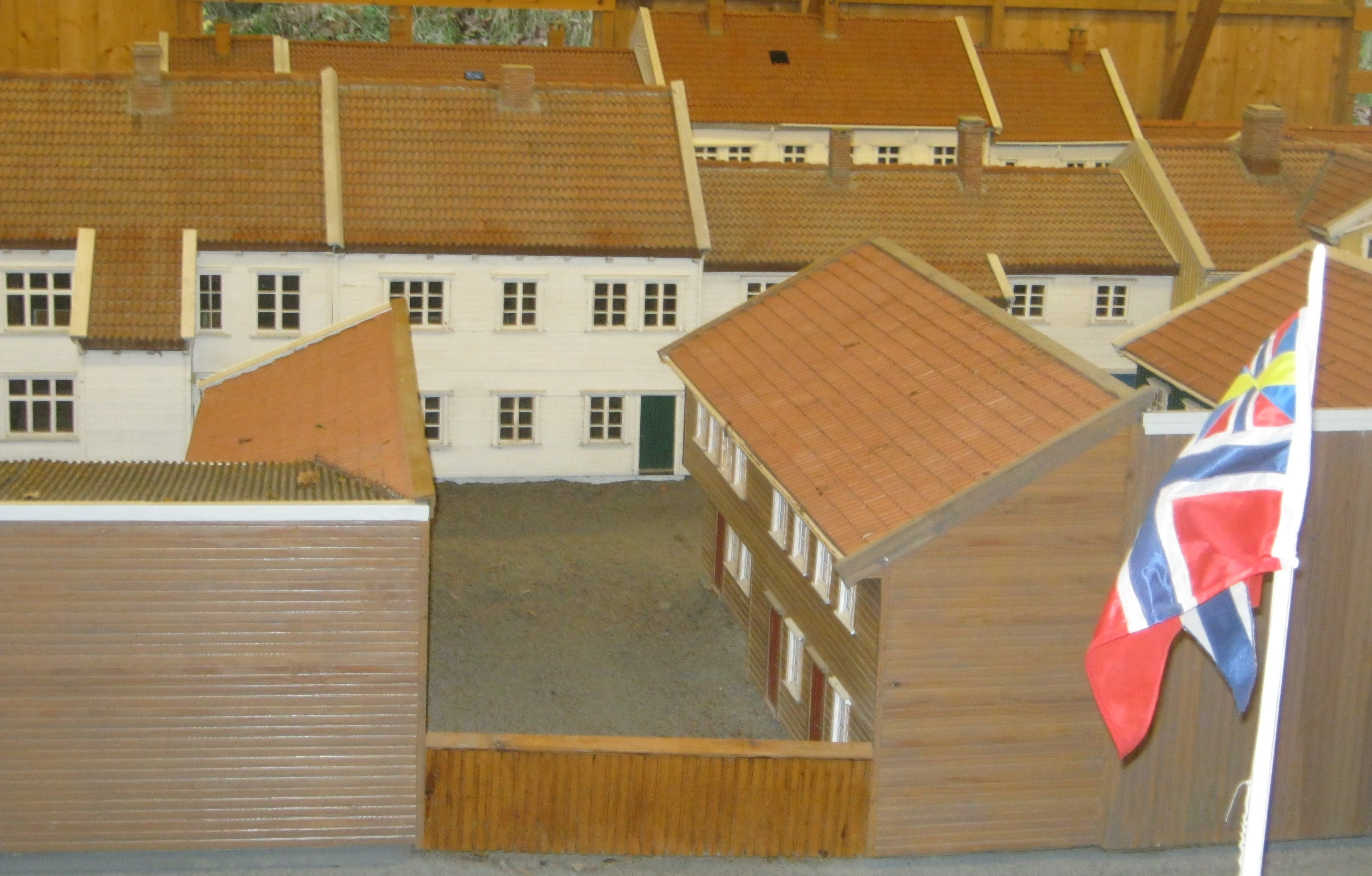 Minibyen i Vest-Agder-museet Kristiansand (Utsnitt)